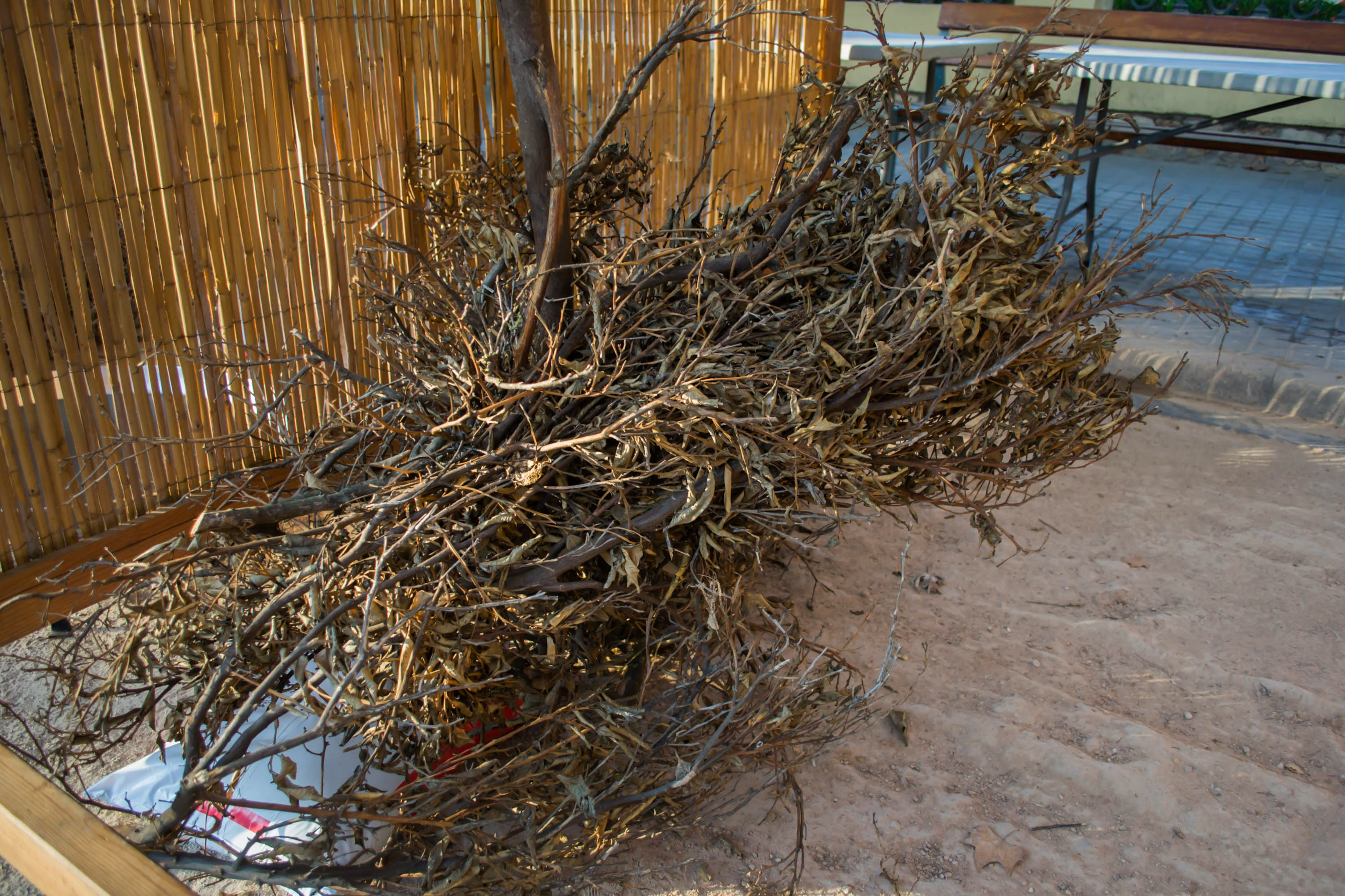 Imágenes del 56 Concurso Internacional de Paellas de Sueca. Leña de naranjo para usarla como combustible.